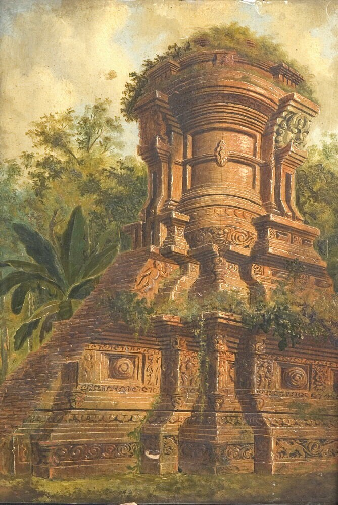 Lukisan Candi Jabung Probolinggo 1840